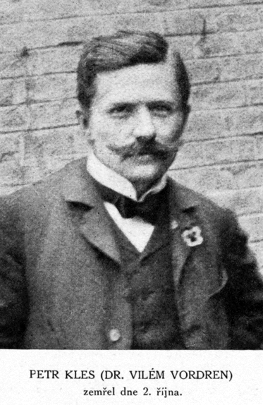 Petr Kles (1869-1916)